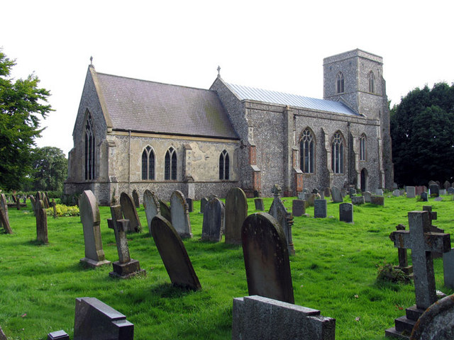 St Botolph, Hevingham, Norfolk